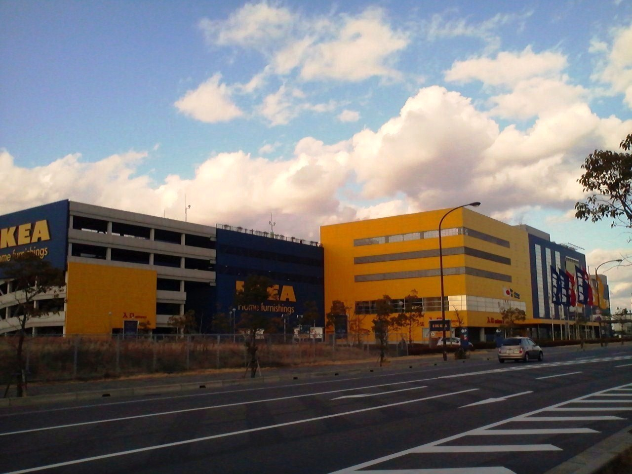 IKEA神戸を撮影。